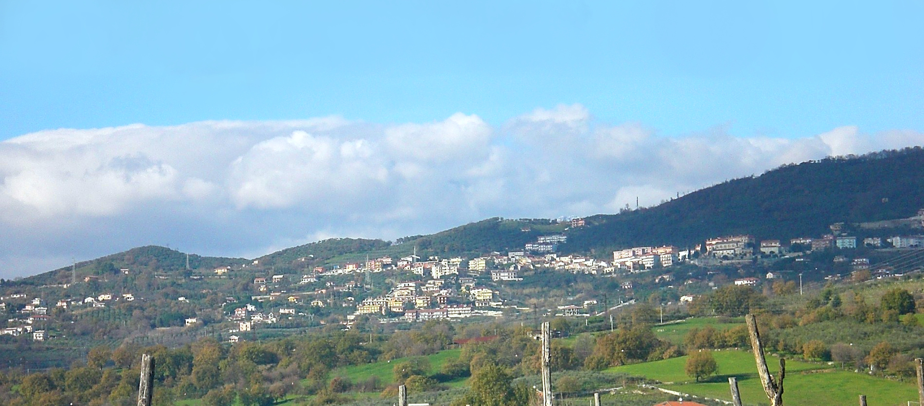 Veduta di Montecorvino Pugliano dalla località S.Vito.